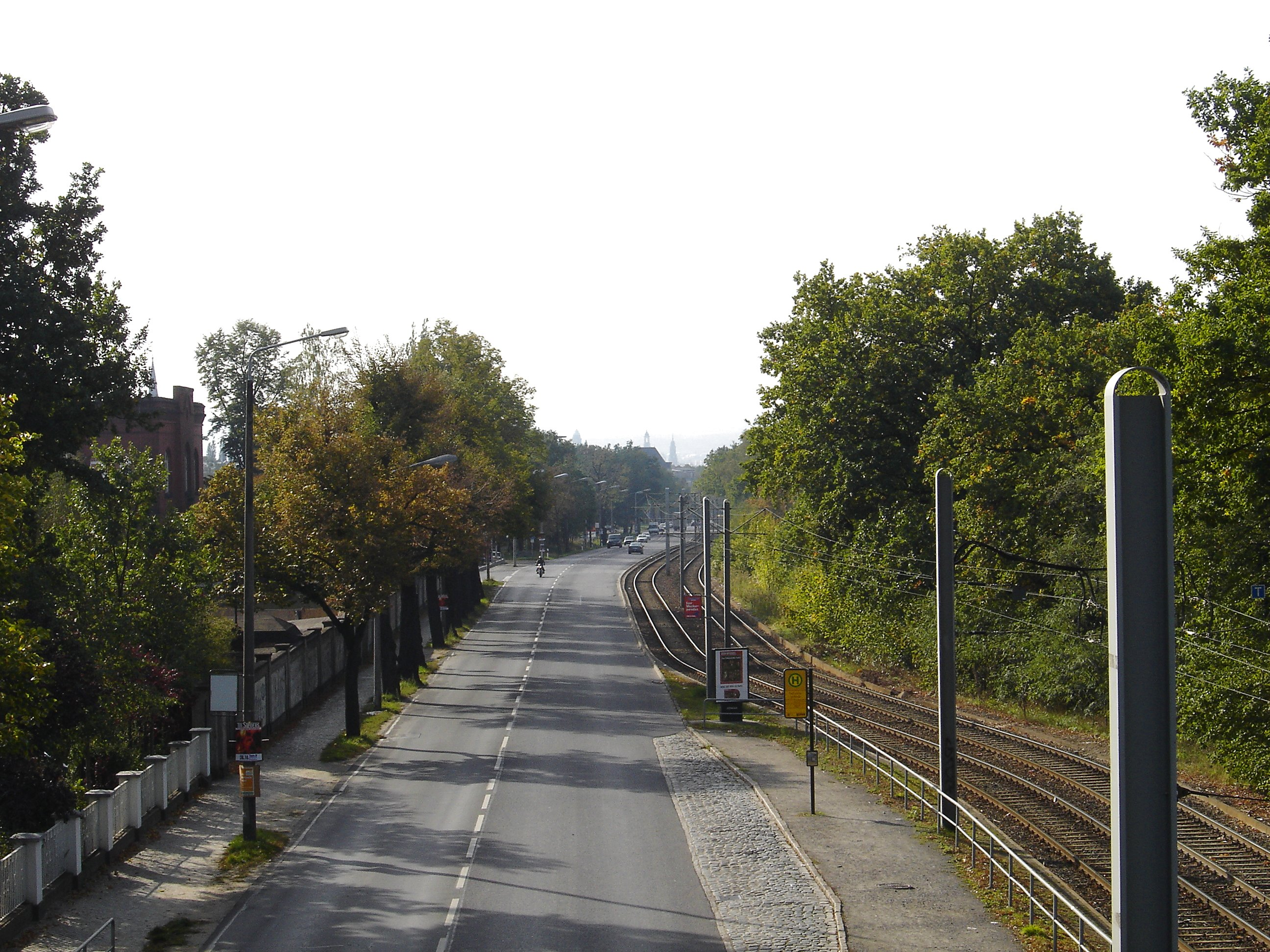 Königsbrücker Straße in der Dresdner Albertstadt